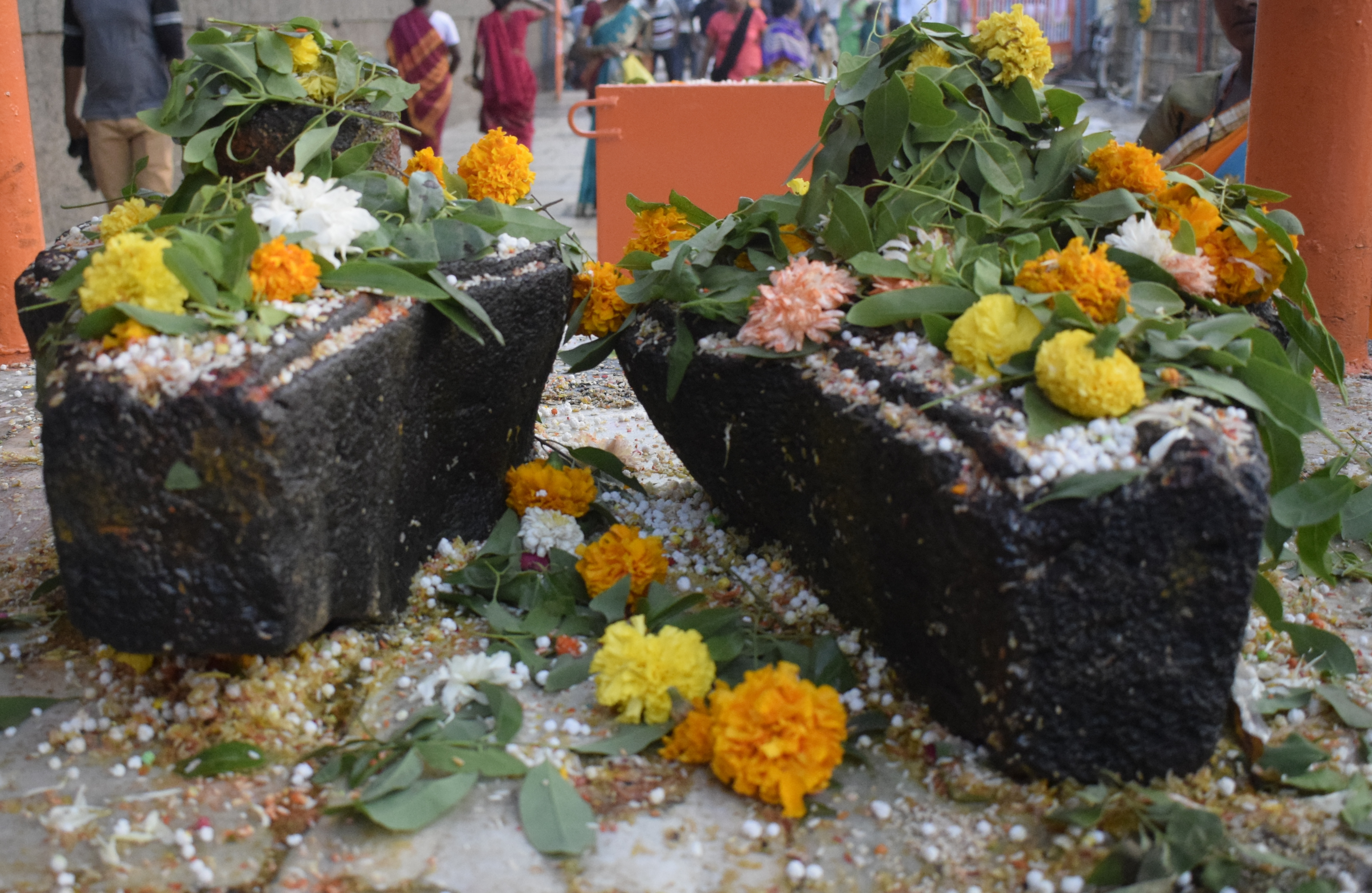 श्री संगमेश्वर लिंग